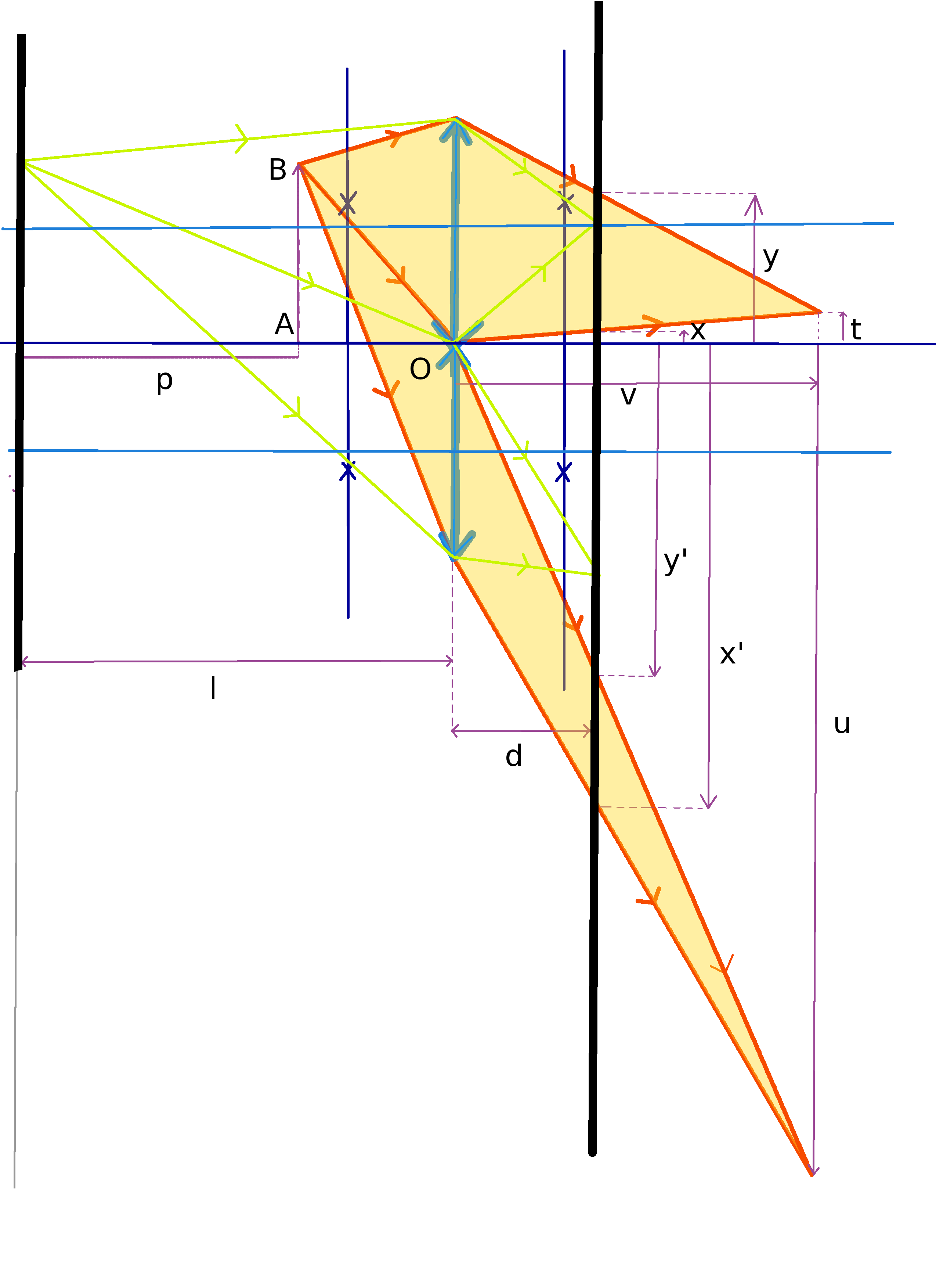 L'objectif donne de la source ponctuelle une image après le capteur principal ou film. Ainsi les lentilles du couple télémétrique vont donner de cette image une autre se formant après les capteurs CCD.